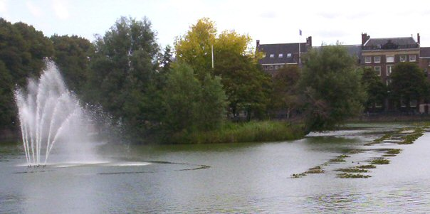 Hofvijver in Den Haag - eigen foto Gebruiker:Känsterle 13 juli 2004 public domain (als de zon schijnt zal ik een betere foto maken)